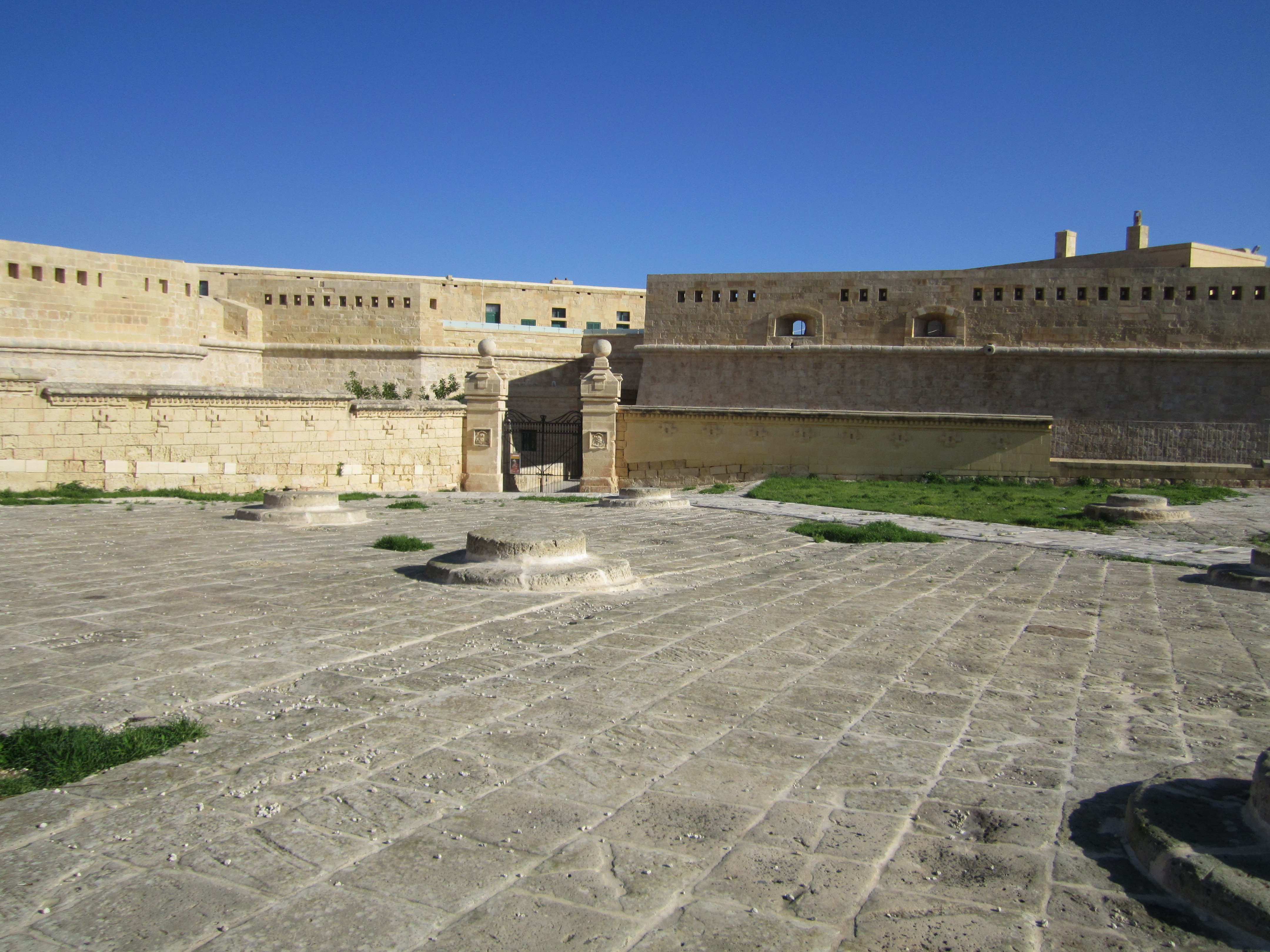 Entrada del Fuerte desde la ciudad